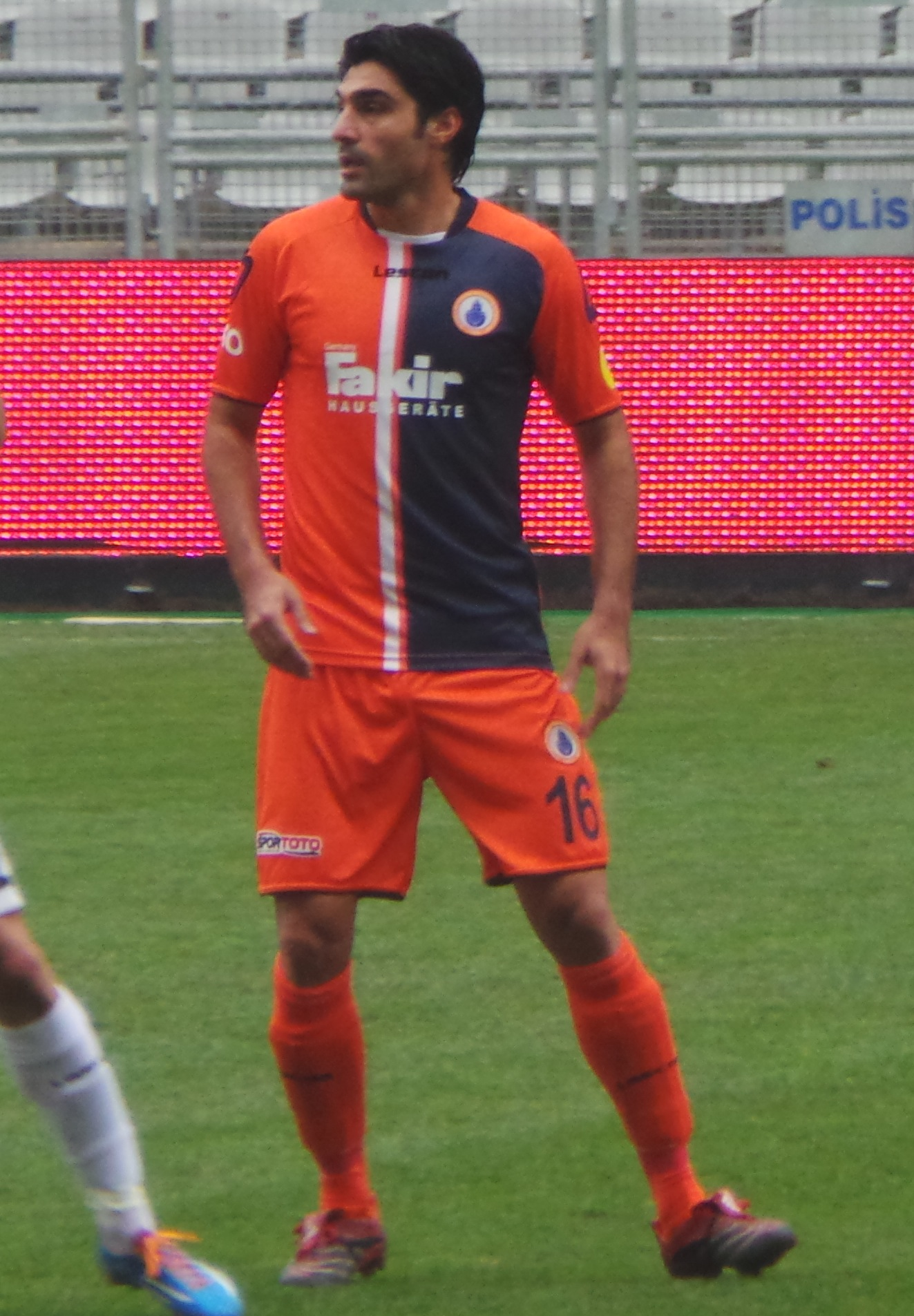 Mustafa Sarp İBB formasıyla